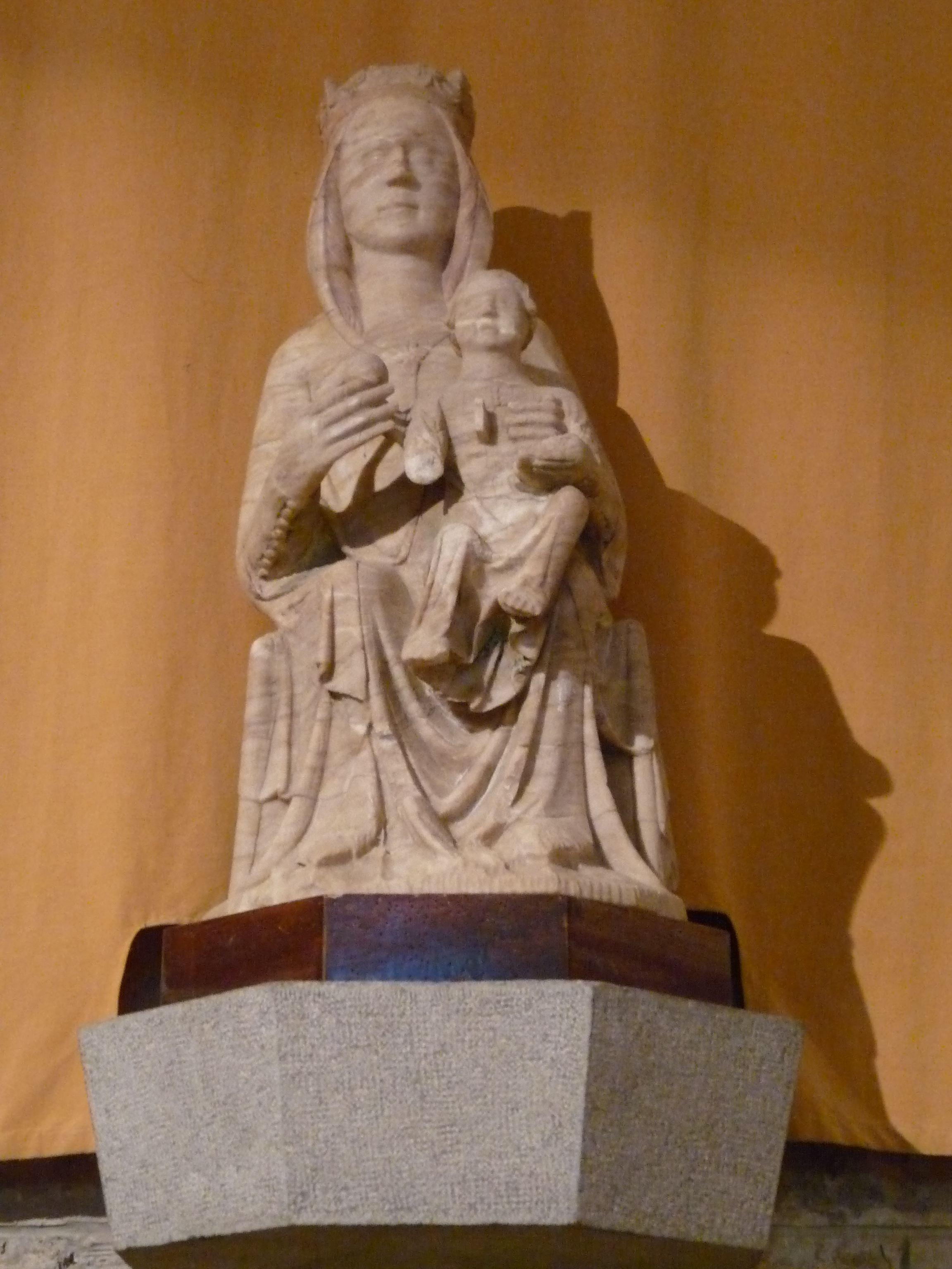 Església Vella de Santa Maria del Collell (Sant Ferriol)